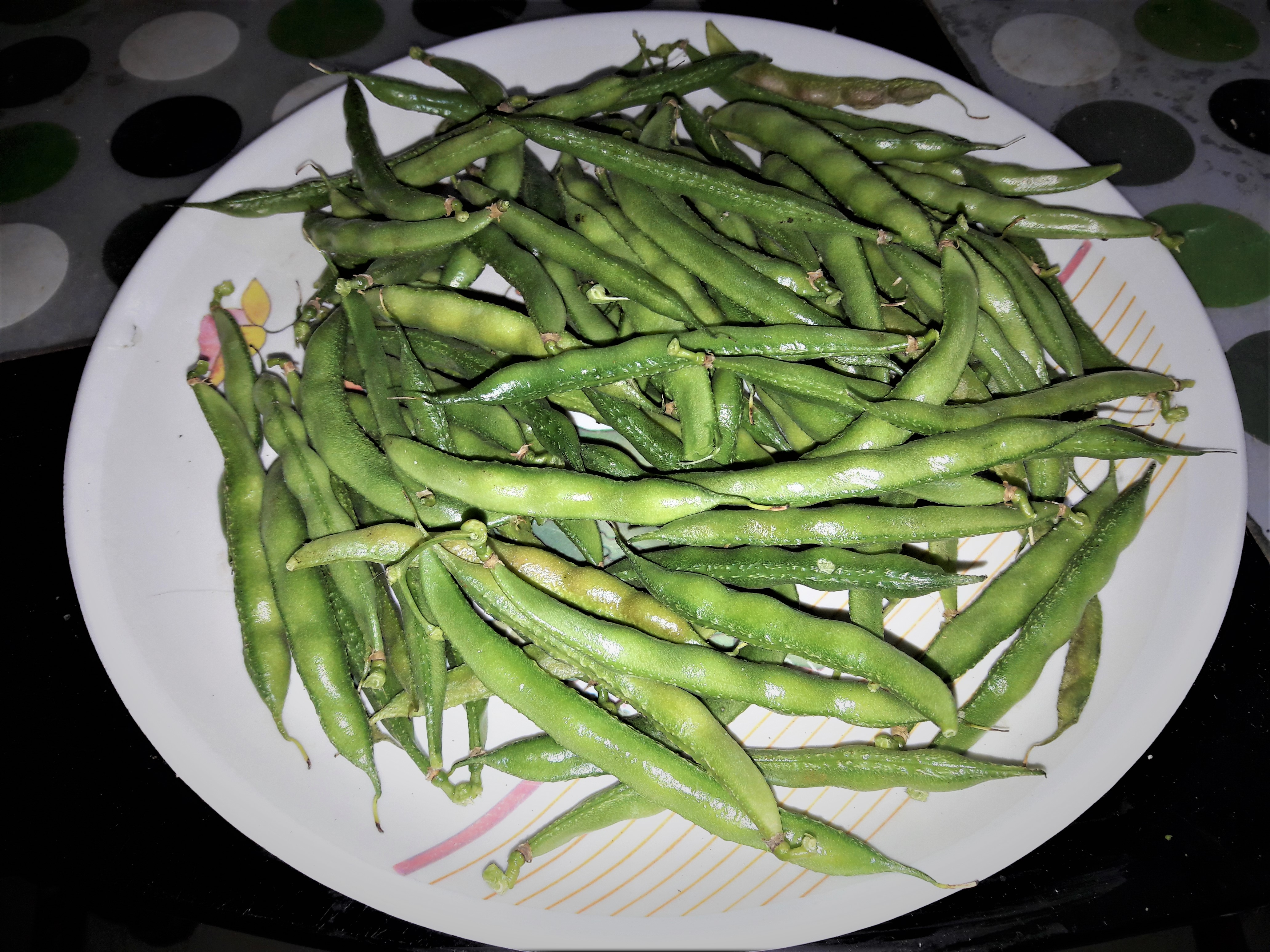 చిక్కుడు కాయలు